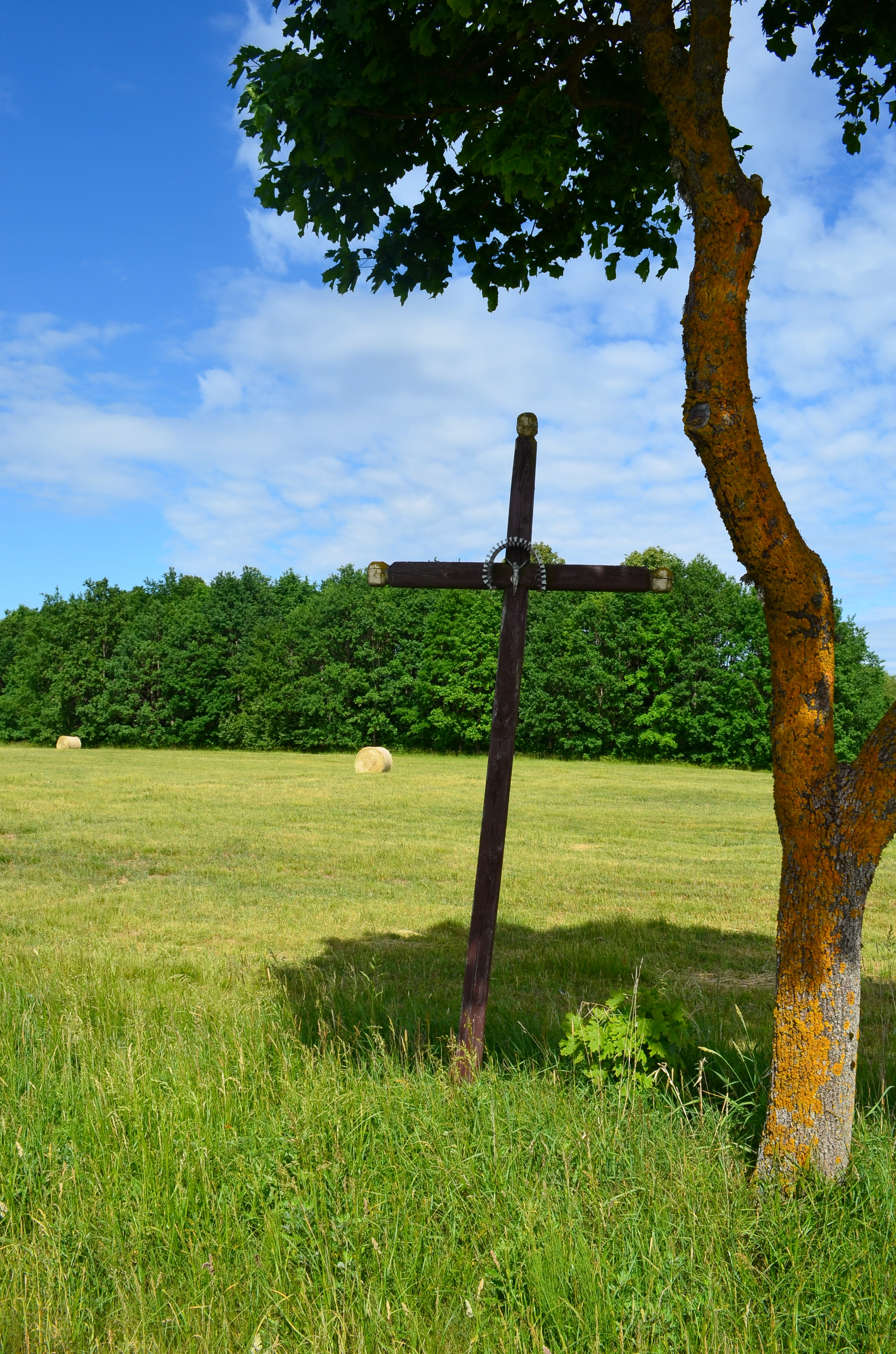 Kryžius, Navasiolka, Balbieriškio sen., Prienų raj.